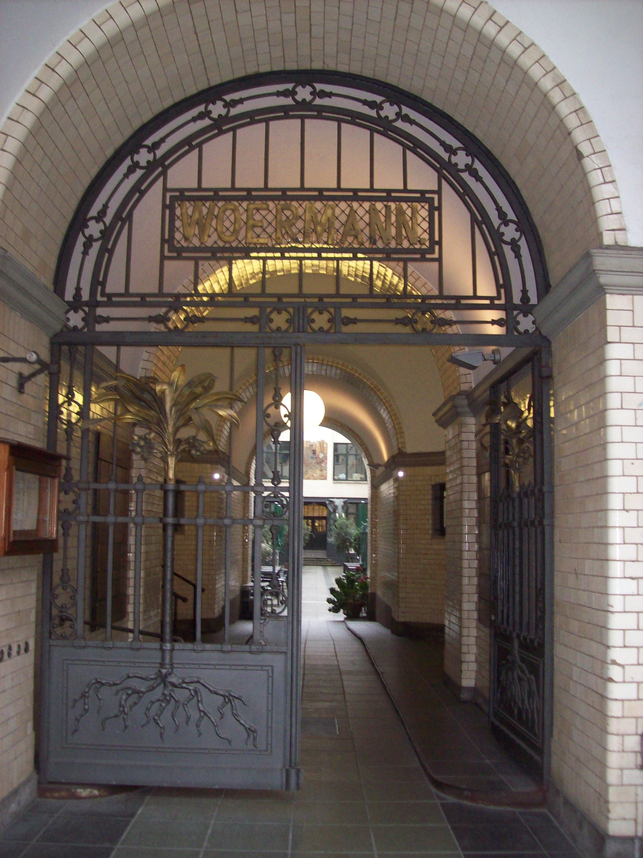 Der Eingang mit dem Firmen-Name der Reederei Woermann in der Großen Reichenstraße. Das Haus wurde erbaut 1899 nach Plänen von Martin Haller. Die Reederei bediente hauptsächlich die Ost-Afrika- Linie und das Haus ist geschmückt mit Afrikanischen Motiven.This is a photograph of an architectural monument.